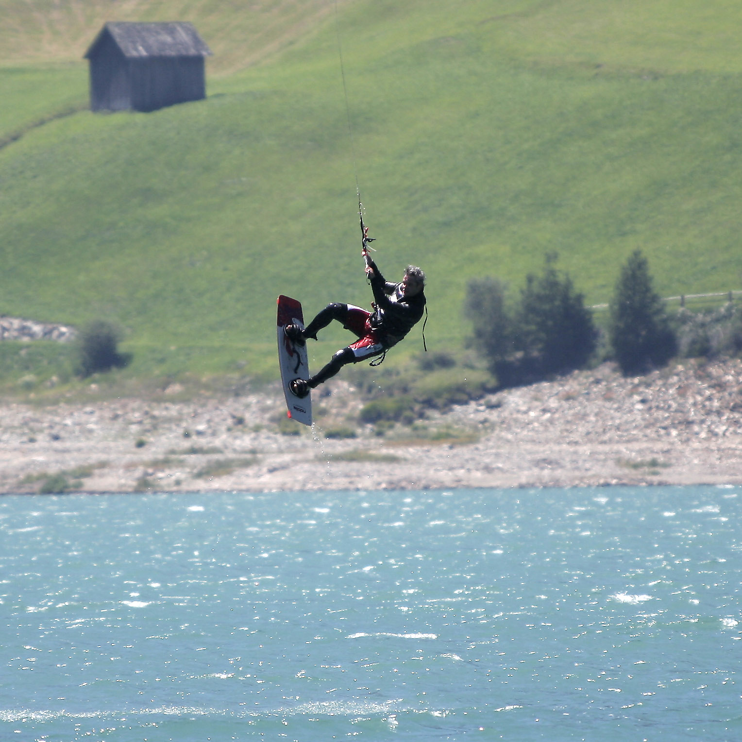 Kitesurfer am Reschensee in Südtirol.